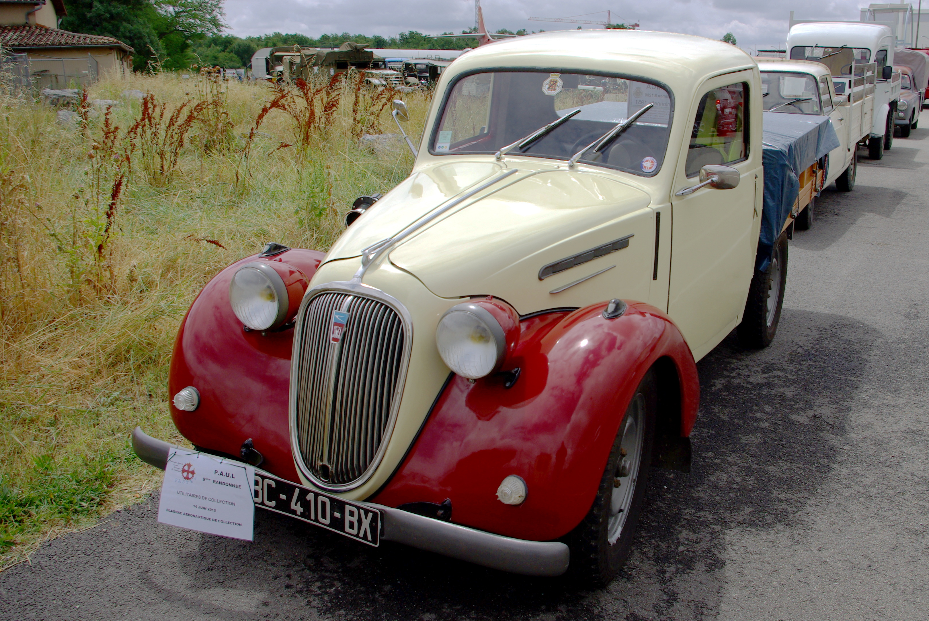 Simca 8 1200 Camionette